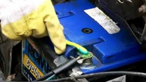 Cómo limpiar la batería del coche